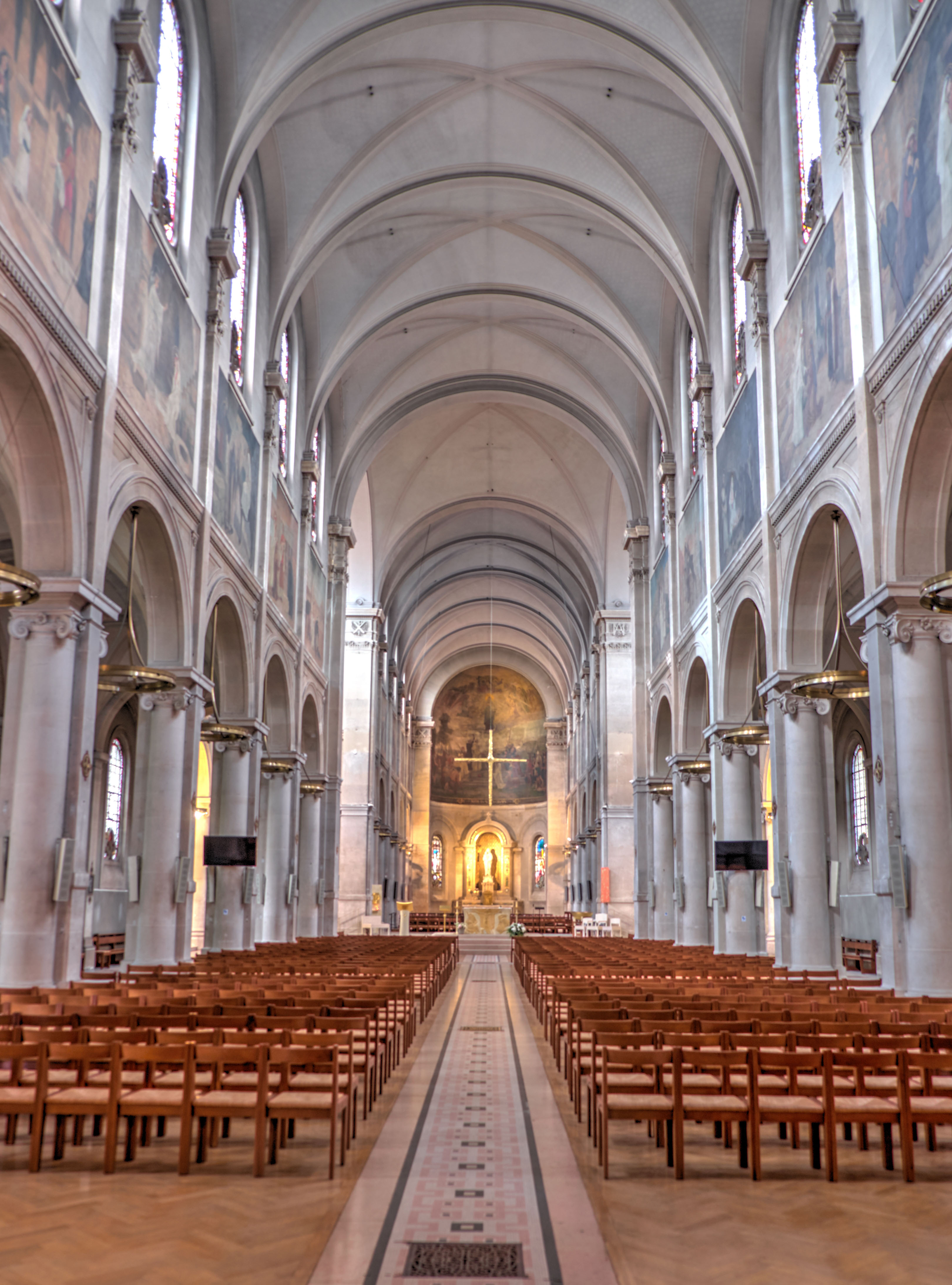 L'intérieur de l'église Notre Dame des Champs à Paris